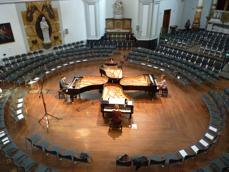 Het Rondane Kwartet in De Duif, Amtsterdam, tijdens het inspelen op vier Faziolivleugels voor een concert.